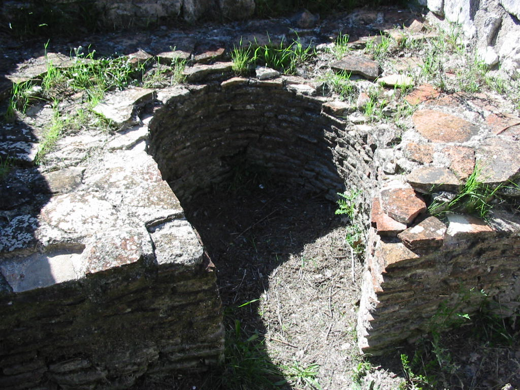 Four sur le site de l'oppidum d'Entremont